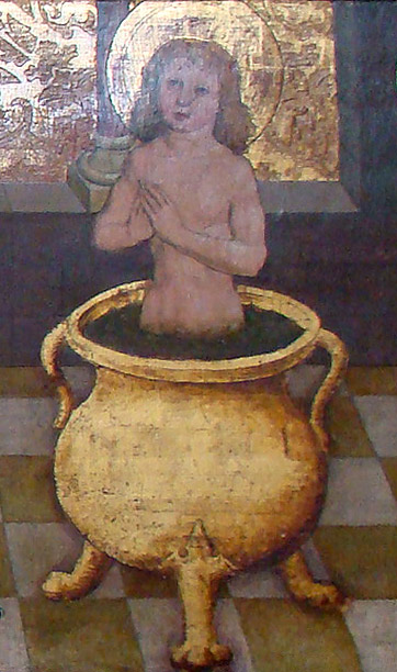 Detail von der Predella des Veitsaltars (dat. 1514 o. 1517) in der Veitskirche in Flein: das Martyrium des Hl. Veit im Kessel mit siedendem Öl